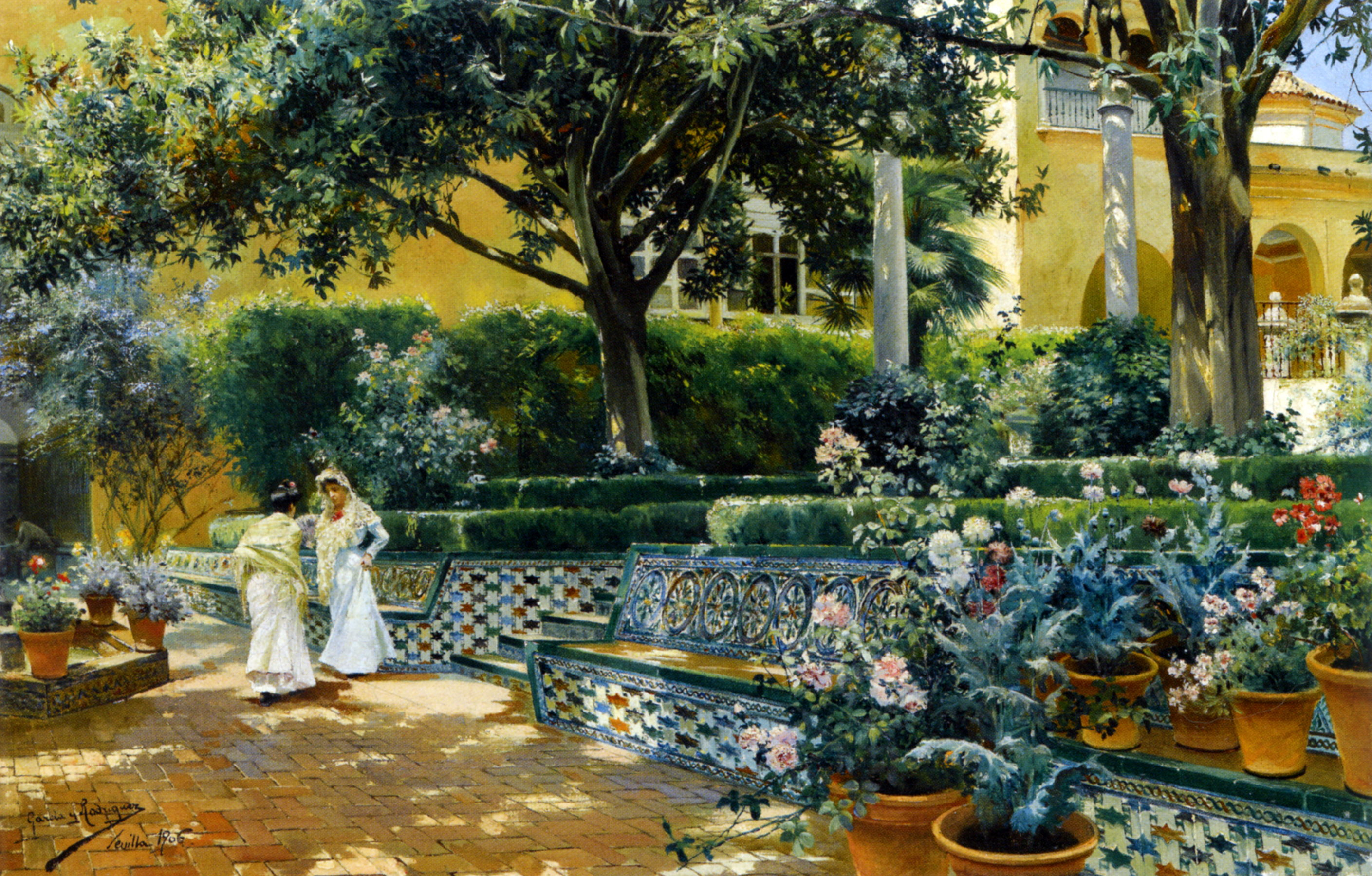 Jardines del Alcázar de Sevilla. Colección particular.